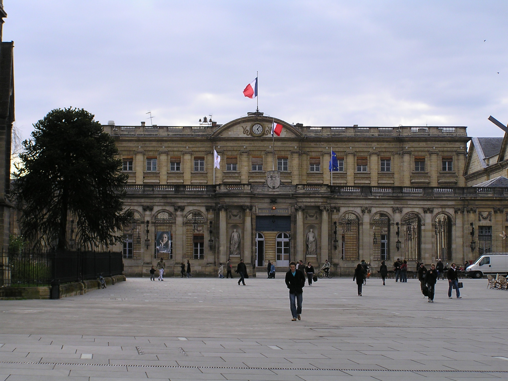 Hotel de Ville (City Hall : Palais Rohan) - Bordeaux (Gironde, Aquitaine, France)